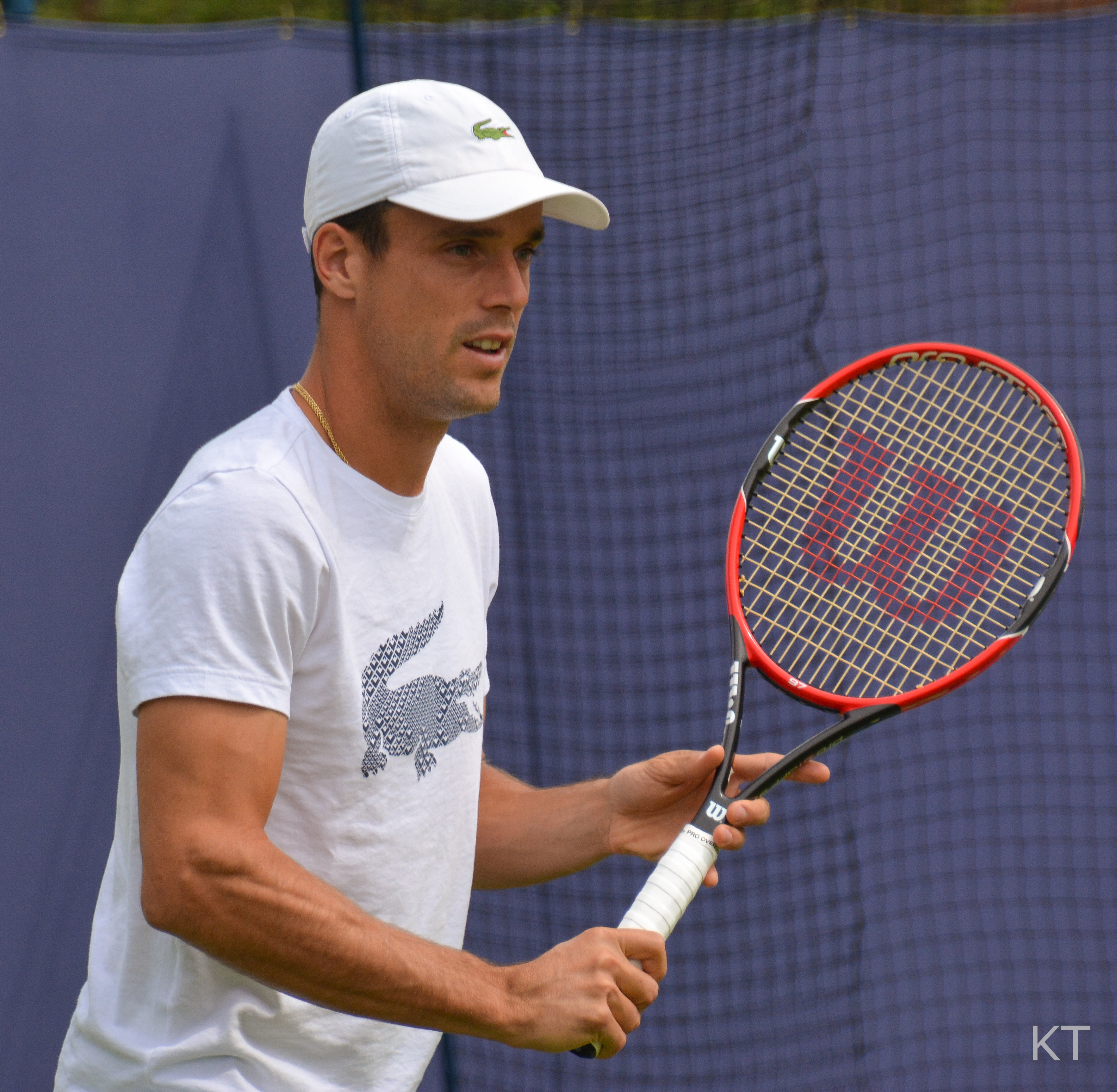 Roberto Bautista Agut